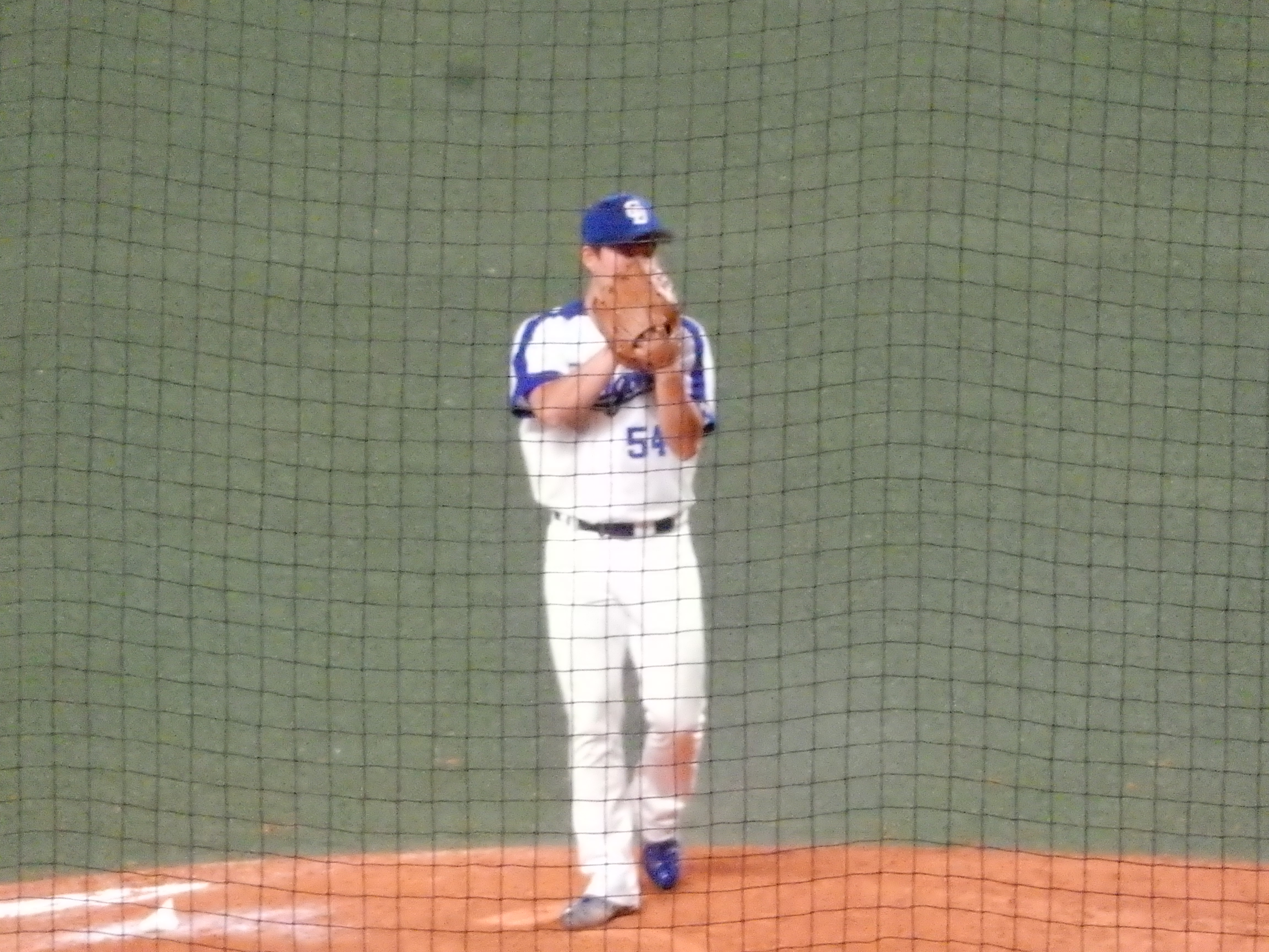 ナゴヤドーム